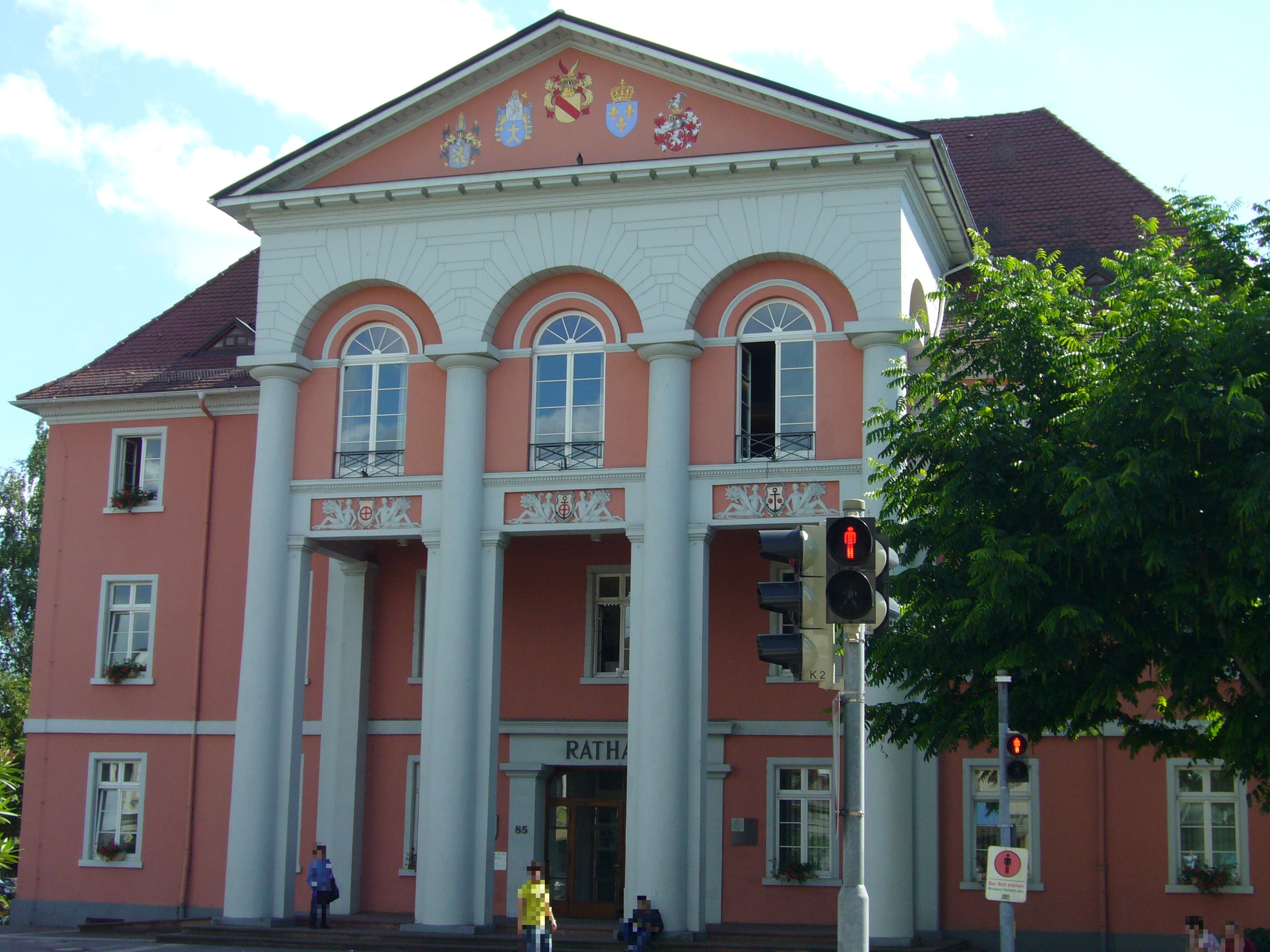 Hôtel de ville de Kehl